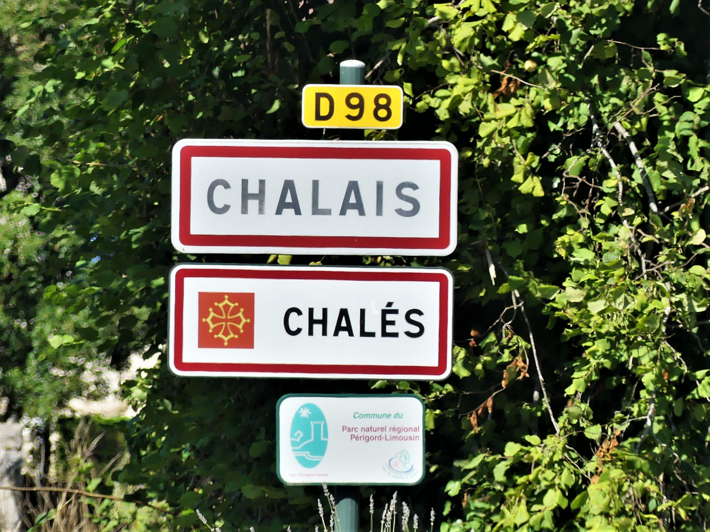 Panneau en français et occitan, Chalais, Dordogne, France.